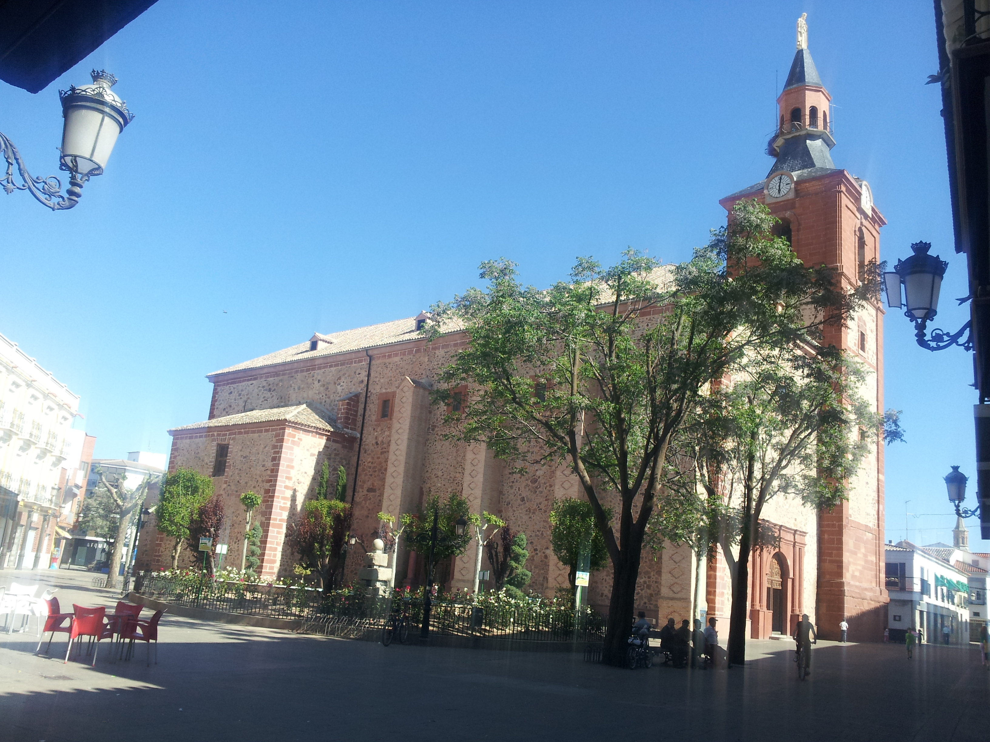 Iglesia de la Inmaculada Concepción, fachadas norte y oeste, sita en la plaza de España o plaza mayor de Herencia, Provincia de Ciudad Real